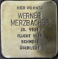 Stolperstein in Konstanz für Werner Merzbacher, Schottenstraße 75